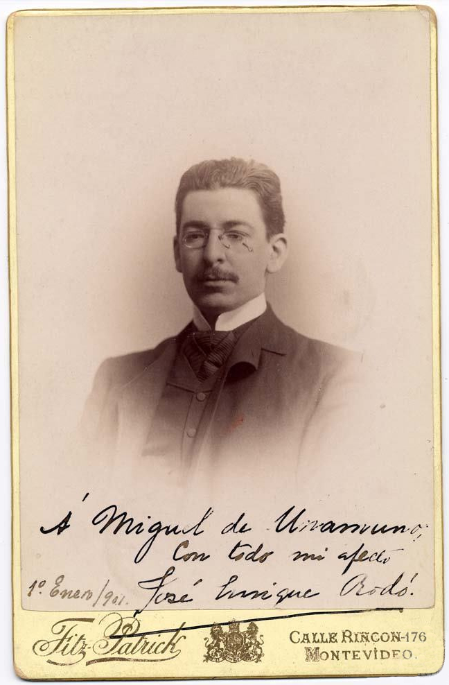 Fotografía del escritor uruguayo José Enrique Rodó dedicada a Unamuno y el reverso con el logo de Fitz-Patrick